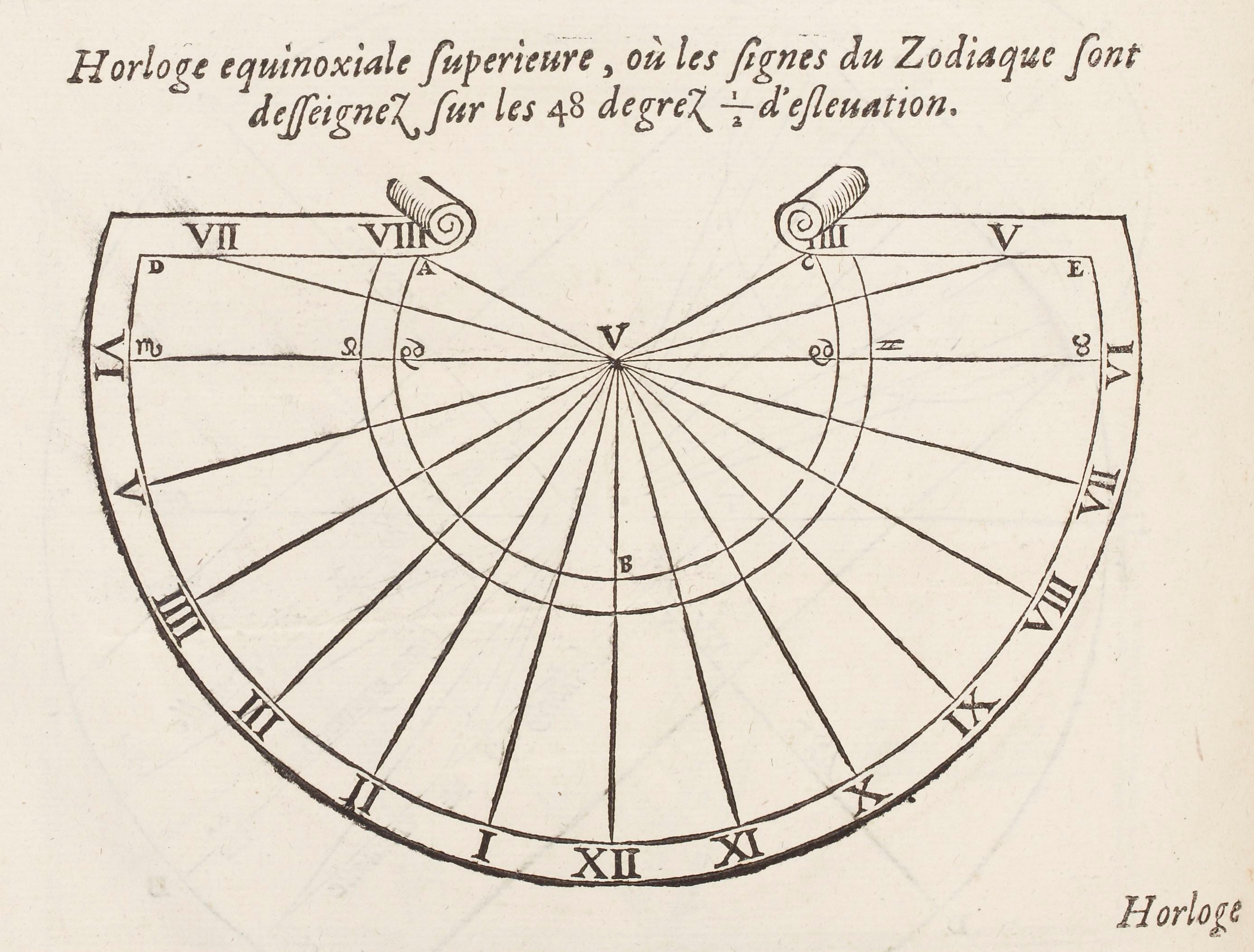 Cadran horizontal, Salomonde Caus, lat. 48° 30'